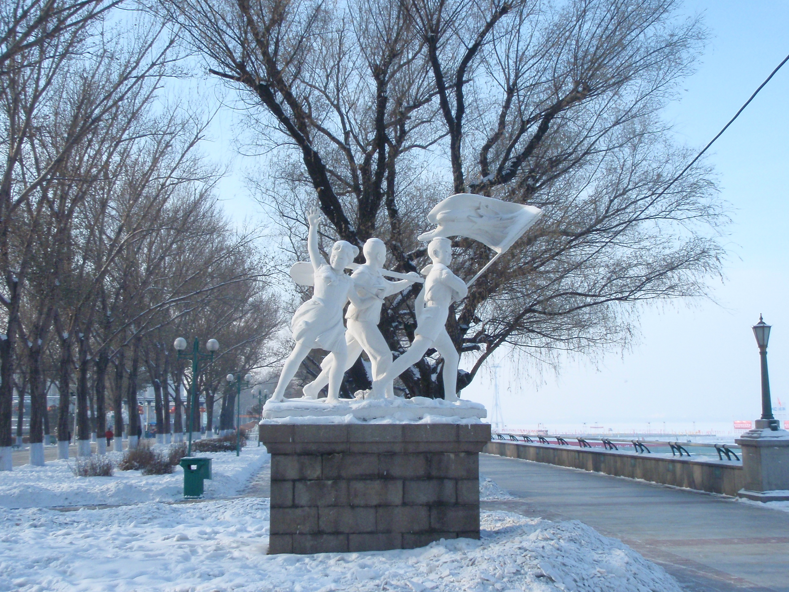 斯大林公园的的雕塑与雪雕真假难辩